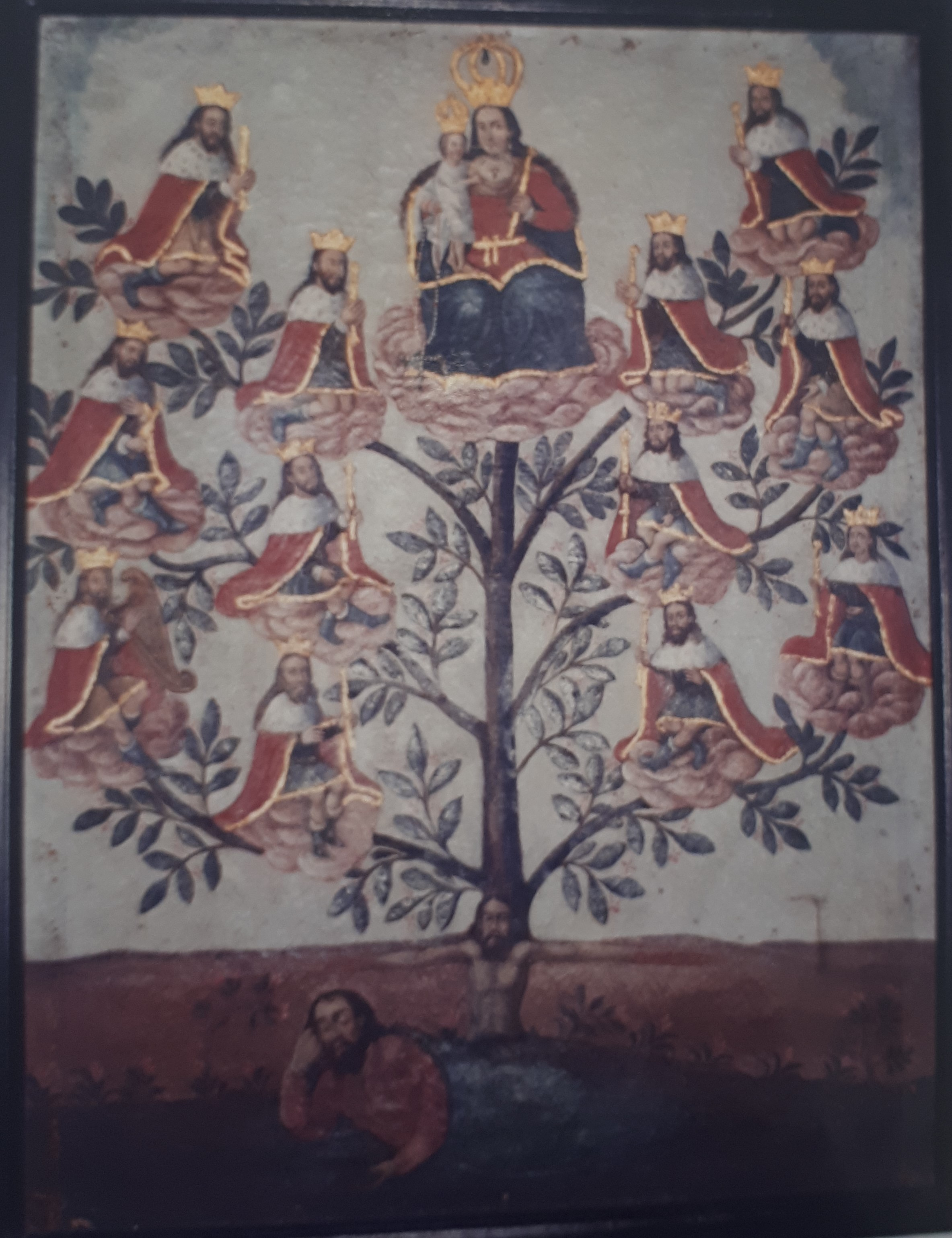 Museo de las Conceptas Dimensiones: 81 cms x 61.